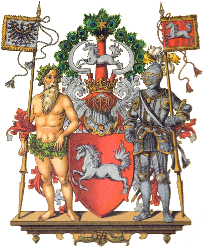 Provinz Hannover. Nedersaksies: 't Saksenros (3 moal) op 't woapen van de olde Prusiese provincie Hannover.